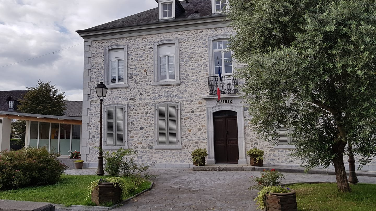 La mairie avec l'extension réalisée en 2018